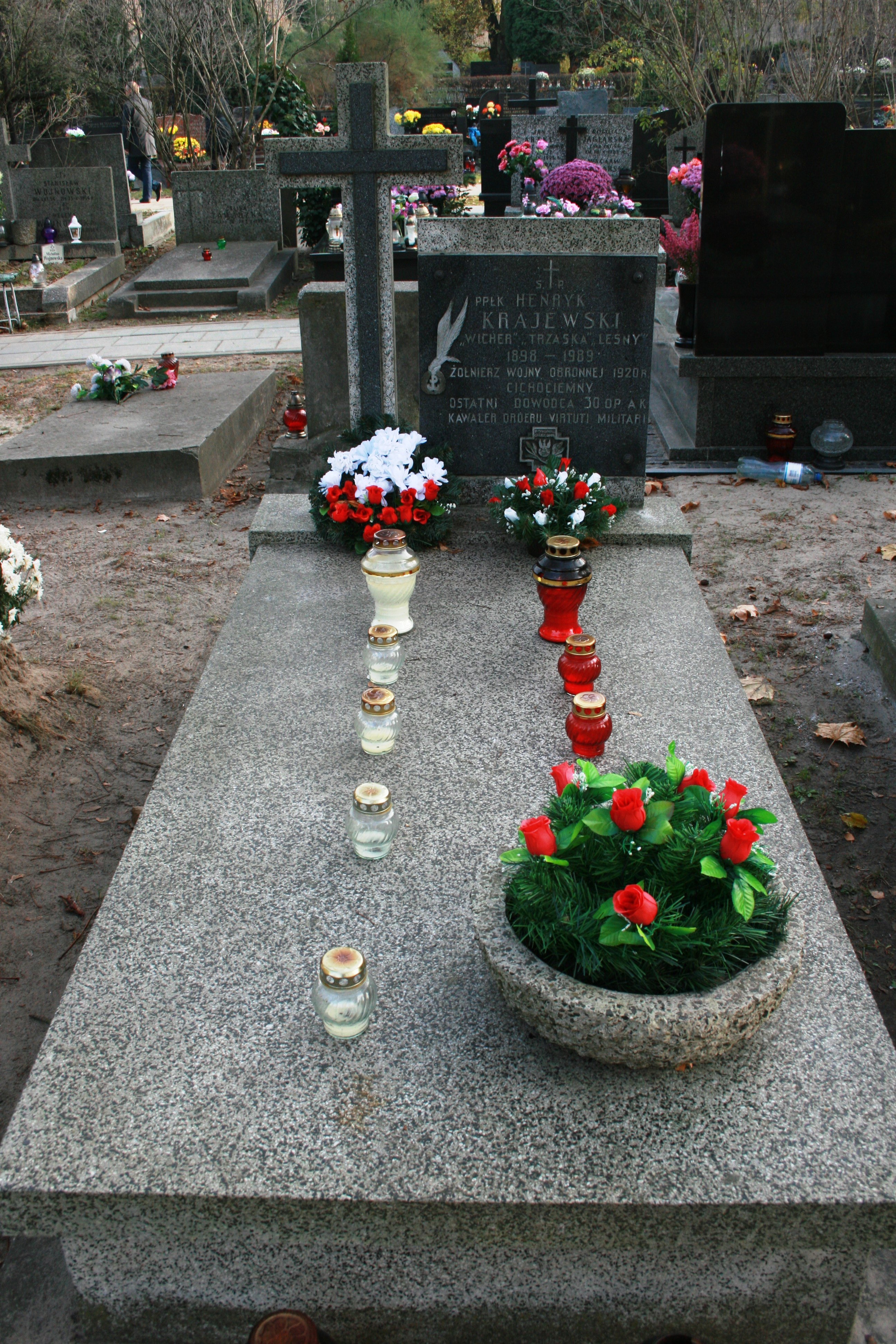 Grób Henryka Krajewskiego na Wojskowym Cmentarzu na Powązkach